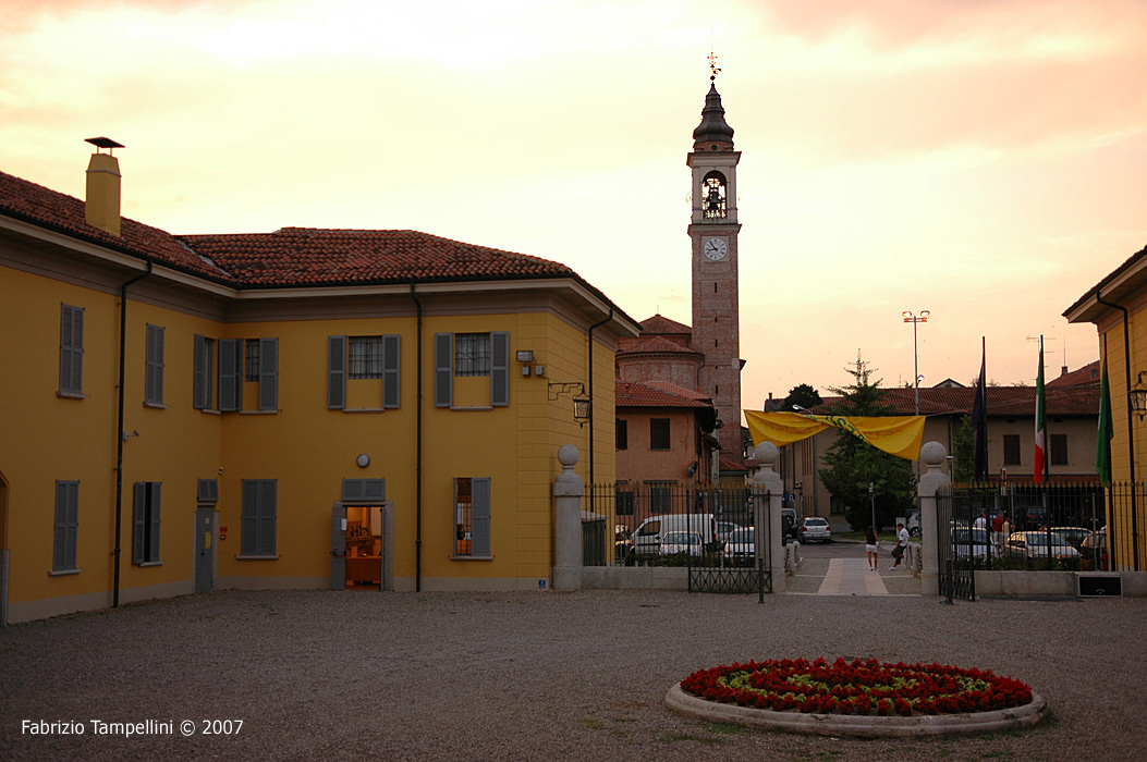 Campanile dalla Villa Annoni